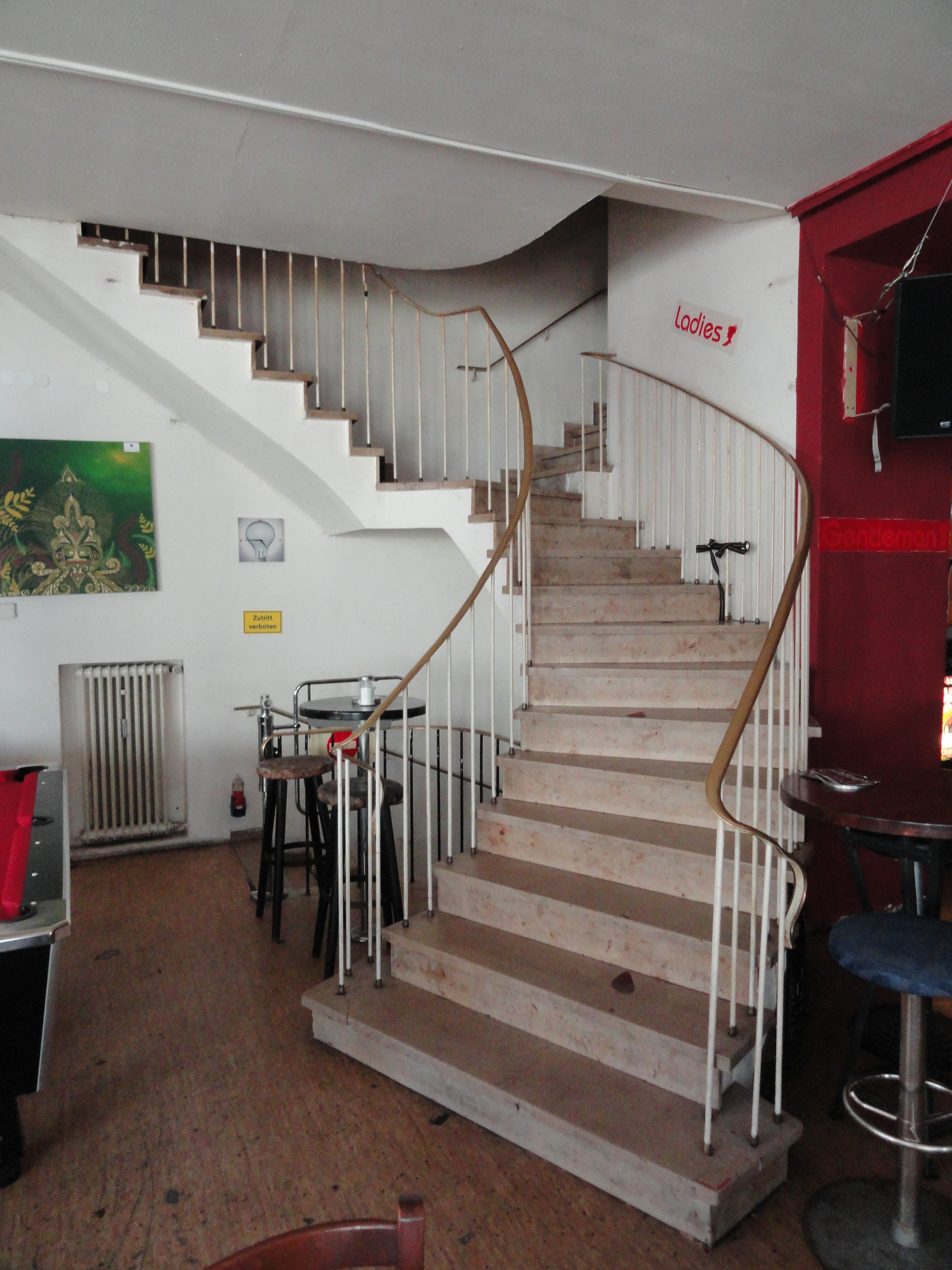 Künsterhaus in Kempten; Einwurfkasten - Bankschließfächer - Bayerisches Wappen